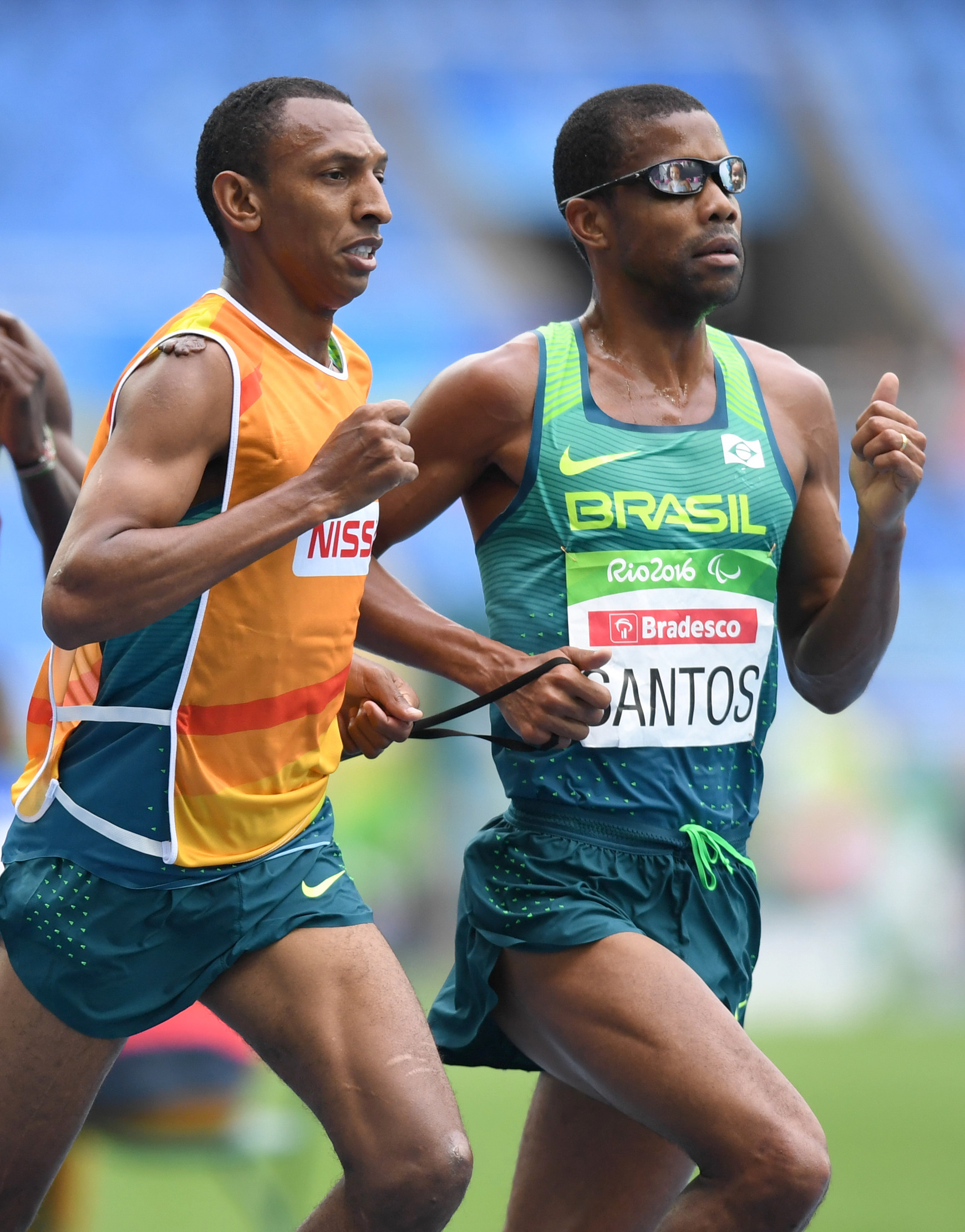 Rio de Janeiro - O brasileiro Odair Santos, 35 anos, conquistou a primeira medalha brasileira nos Jogos Paralímpicos Rio 2016. Ele ficou em segundo lugar nos 5000 metros rasos (Tânia Rêgo/Agência Brasil)